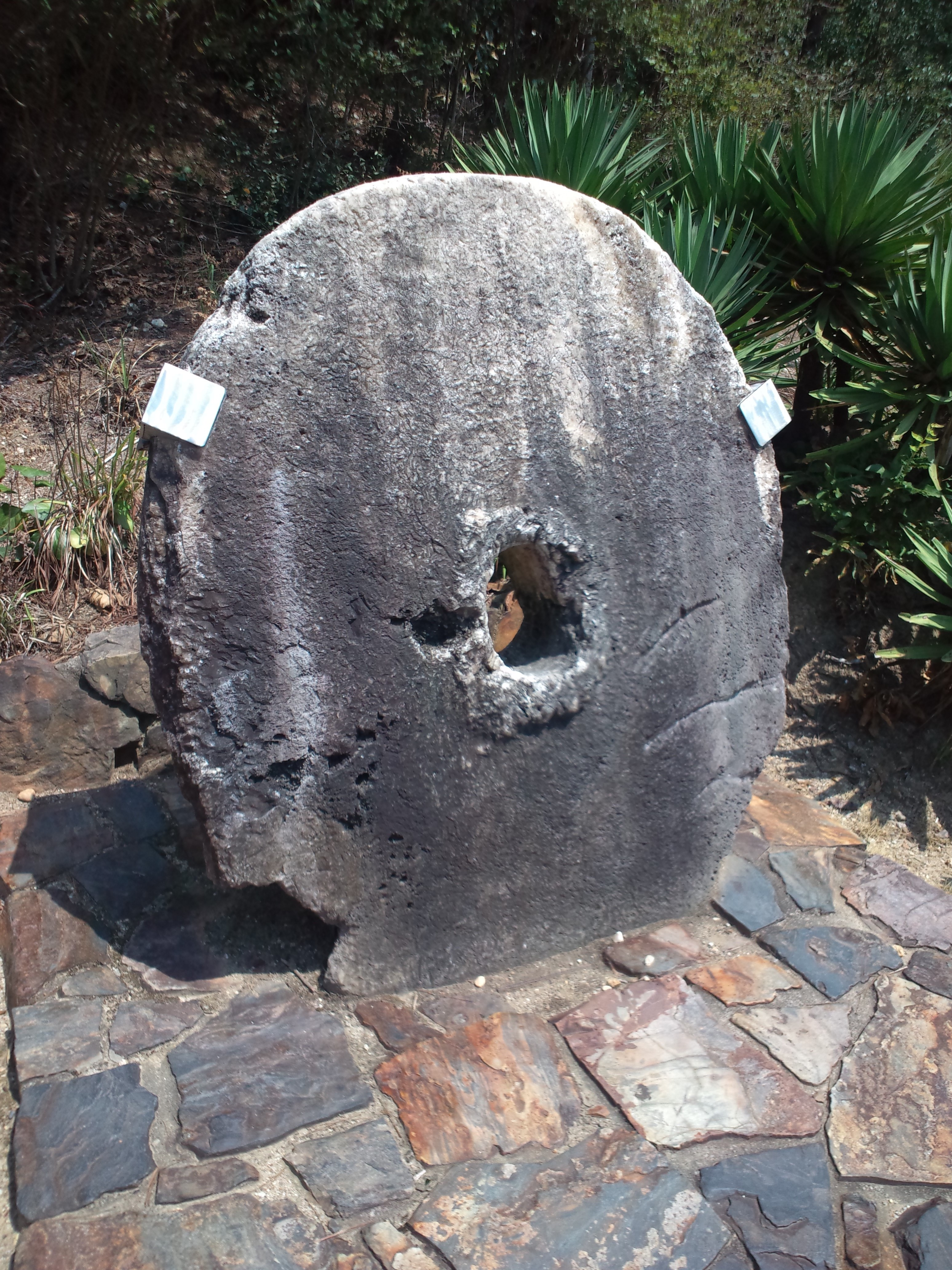 リトルワールド ミクロネシア、ヤップ島の石貨